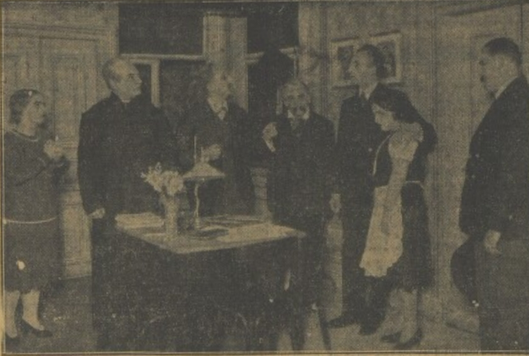 Představení hry Pan Učitel v Divadle Akropolis Žižkov. Na fotografii zleva : Věra Durstová, Vojta Záhořík, Rudolf Hrušínský, Viktor Očásek, Karel Třešňák, Laura Želenská Třešňáková, Karel Kalista